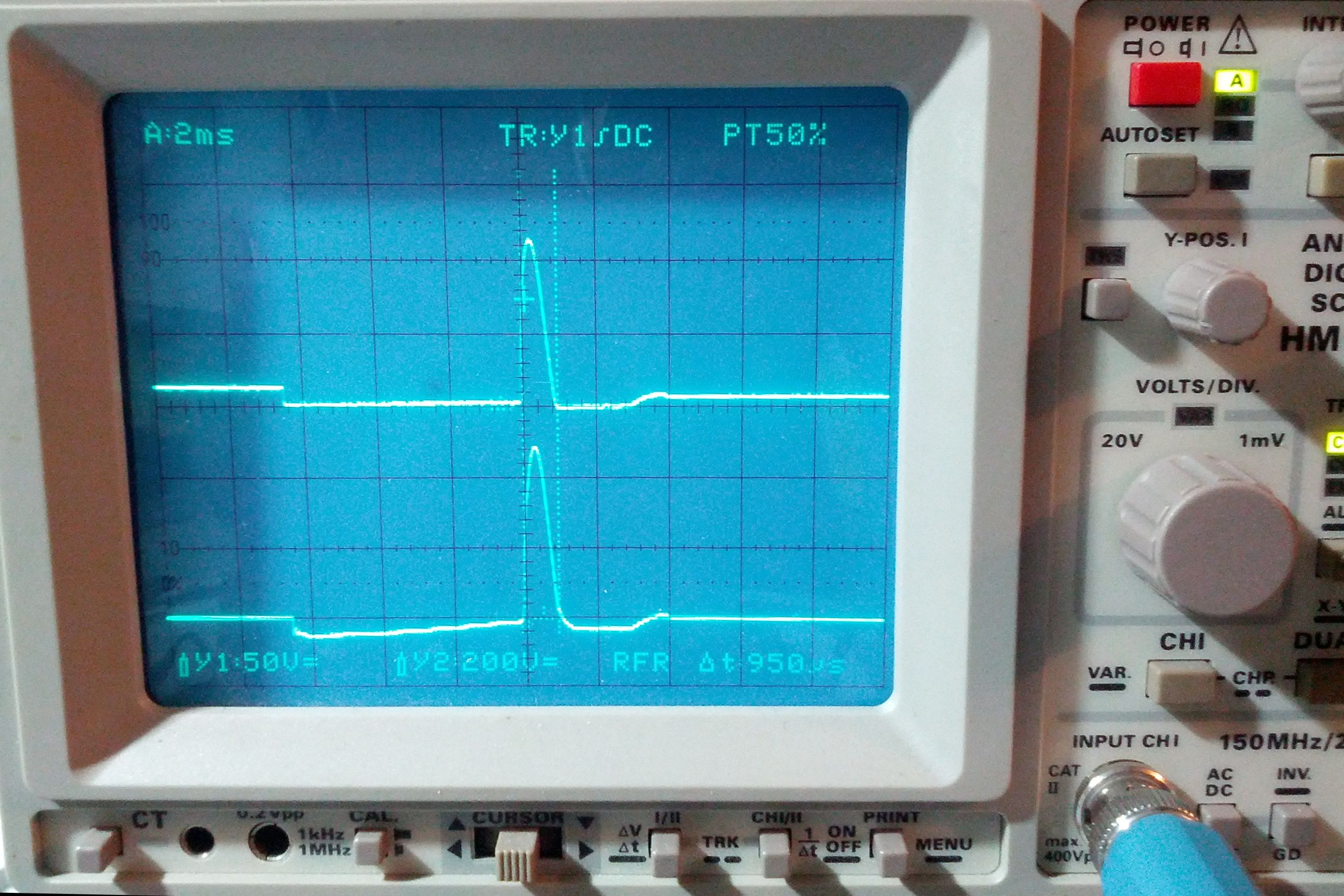 Signalkurve eines Weidezaungerätes Ausgang (oben): 4000 Volt, Impulsbreite 1 Millisekunde, Impulsperiode 1,5 Sekunden, Ladezeit des Kondensators 6.5 Millisekunden Eingang (unten): 120 Volt